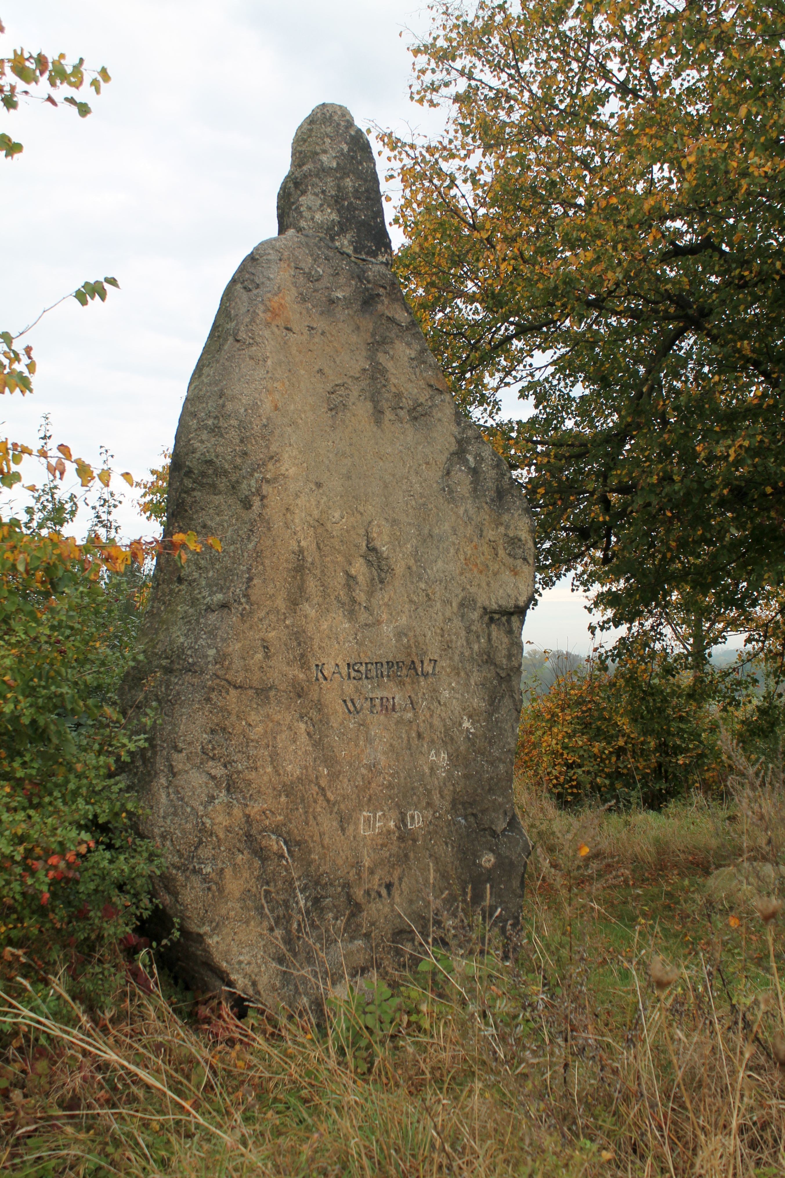 Gedenkstein von 1875. Pfalz Werla, Schladen-Werla, Niedersachsen, Deutschland.